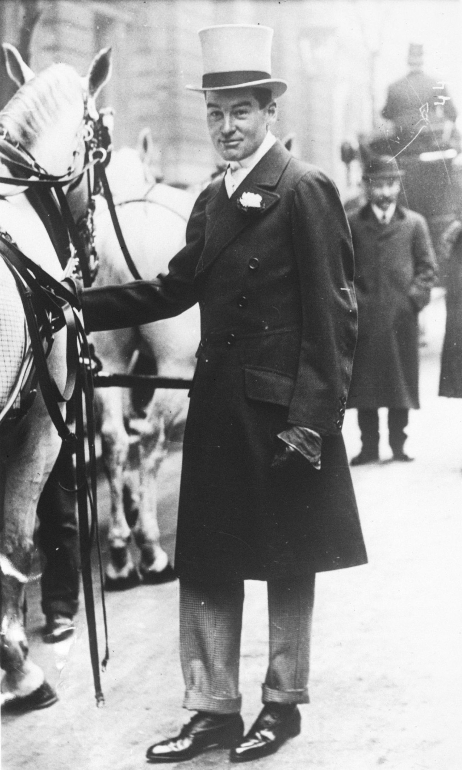 Alfred Gwynne Vanderbilt, le fameux millionnaire qui était à bord du Lusitania (paquebot coulé le 7 mai 1915 par un sous-marin allemand).